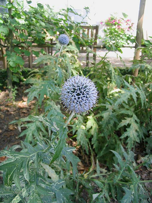 Echinops bannaticus ; Photo prise au parc botanique de Meise en août 2004 ; Jean Tosti 09/2004